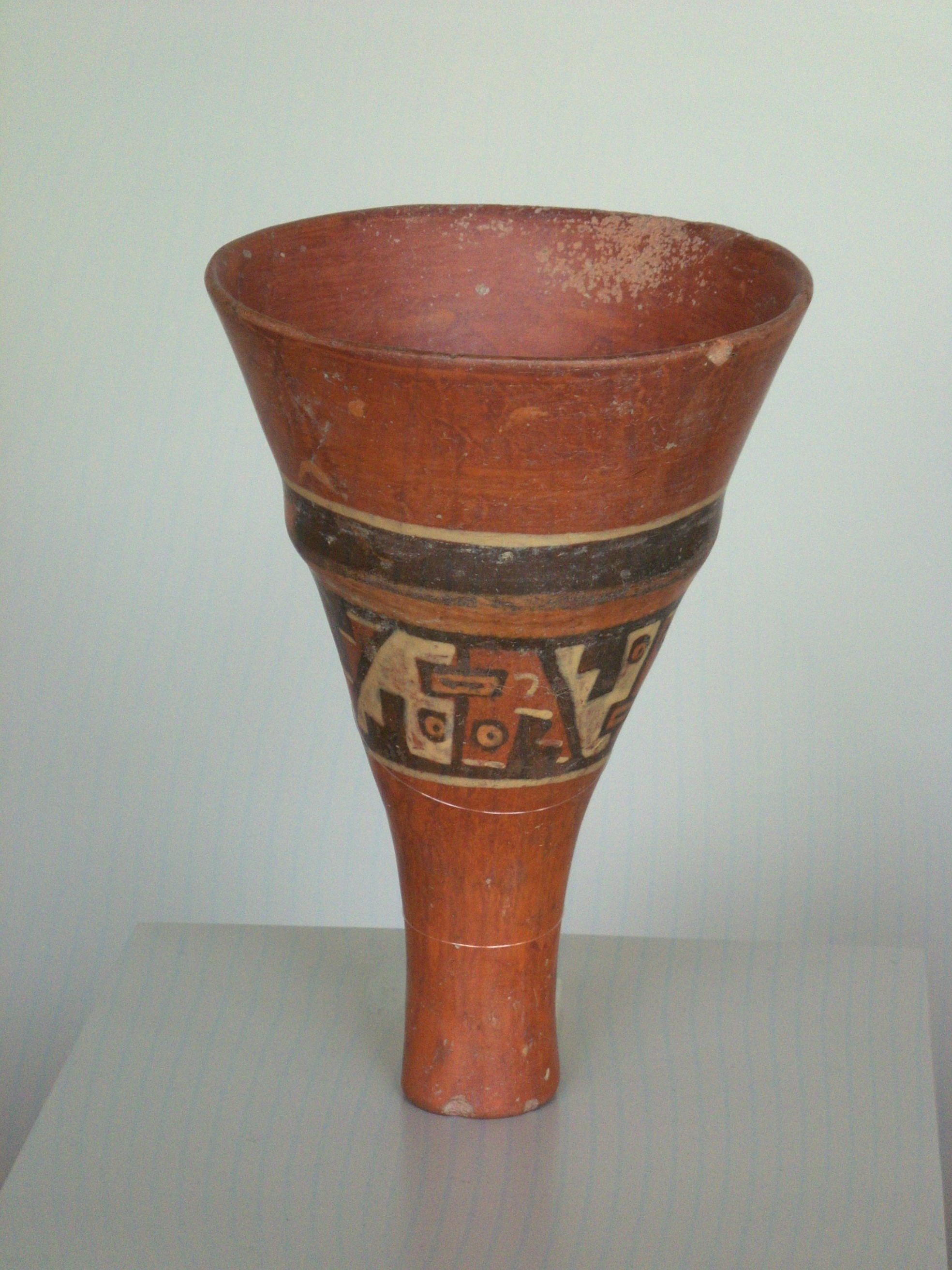 Vaso de la cultura Tiwanaku. Museo de Arqueologìa de Pueblo Libre Lima, Perù